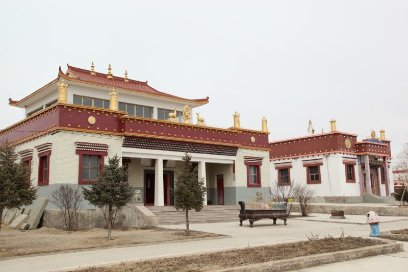 中文（中国大陆）: 内蒙乌兰浩特葛根庙4